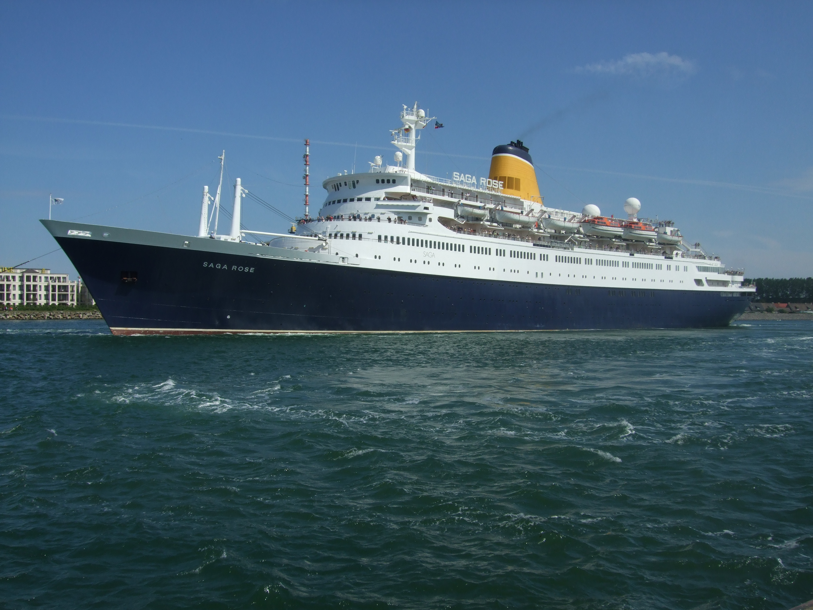 Die Saga Rose bei der Ausfahrt aus Warnemünde am 30. Mai 2009